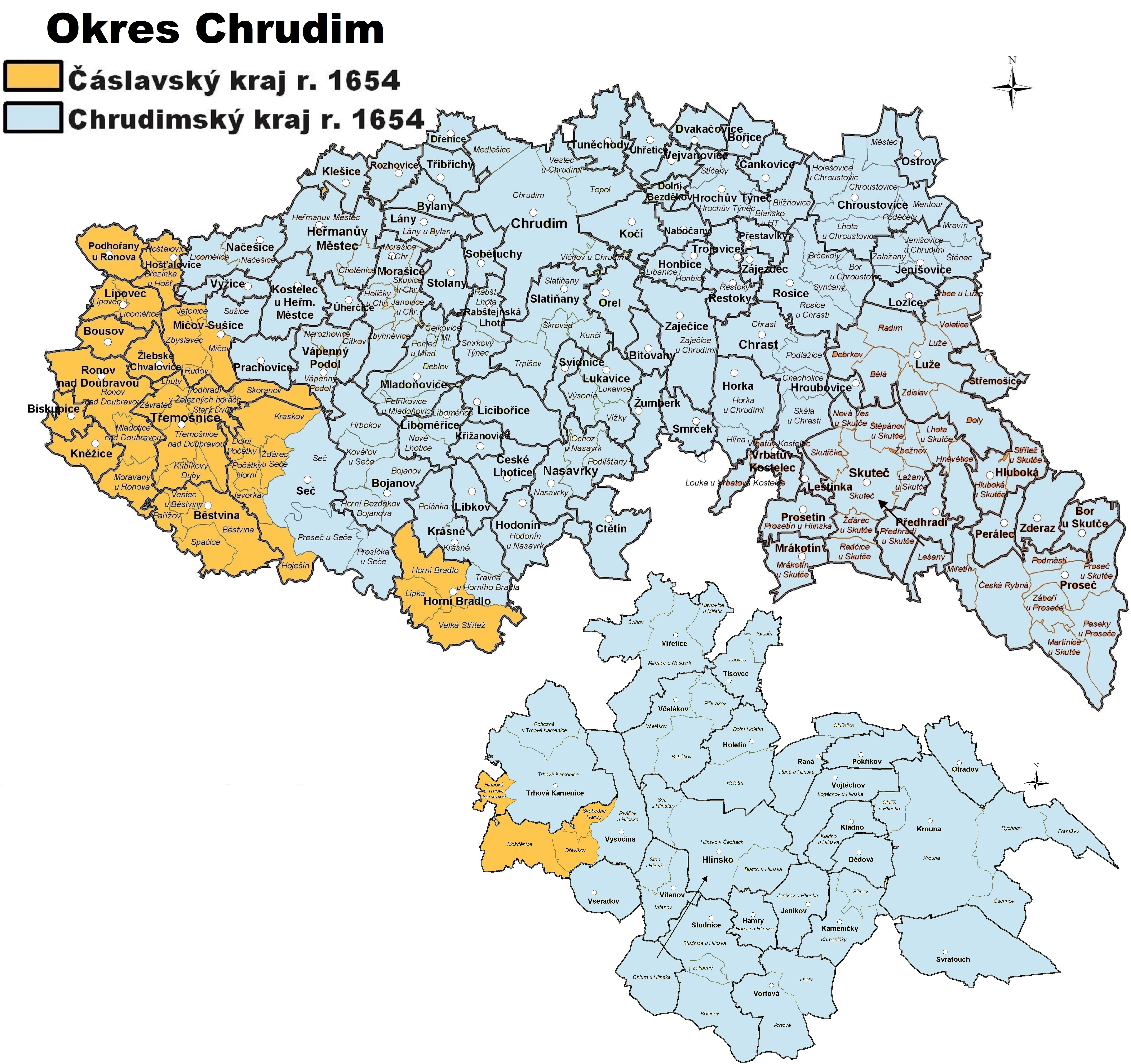 Čáslavský kraj r. 1654 v dnešním okrese Chrudim